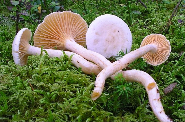 Hygrophorus karstenii fotografati in Svezia